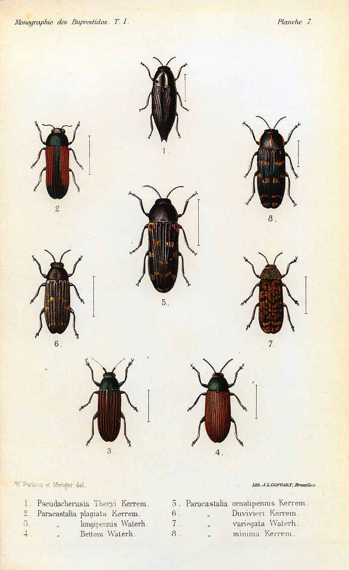 Pseudacherusia Theryi Kerrem. = Pseudacherusia theryi Kerremans, 1905 Paracastalia plagiata Kerrem. = Paracastalia plagiata (Kerremans, 1899) Paracastalia longipennis Waterh. = Paracastalia plagiata (Kerremans, 1899) Paracastalia Bettoni Waterh. = Paracastalia bettoni Waterhouse, 1904 Paracastalia ornatipennis Kerrem. = Paracastalia duvivieri (Kerremans, 1898) Paracastalia Duviveri Kerrem. = Paracastalia duvivieri (Kerremans, 1898) Paracastalia variegata Waterh. = Neopolycesta caffra (Thunberg, 1787) Paracastalia minima Kerrem. = Paracastalia minima Kerremans, 1905